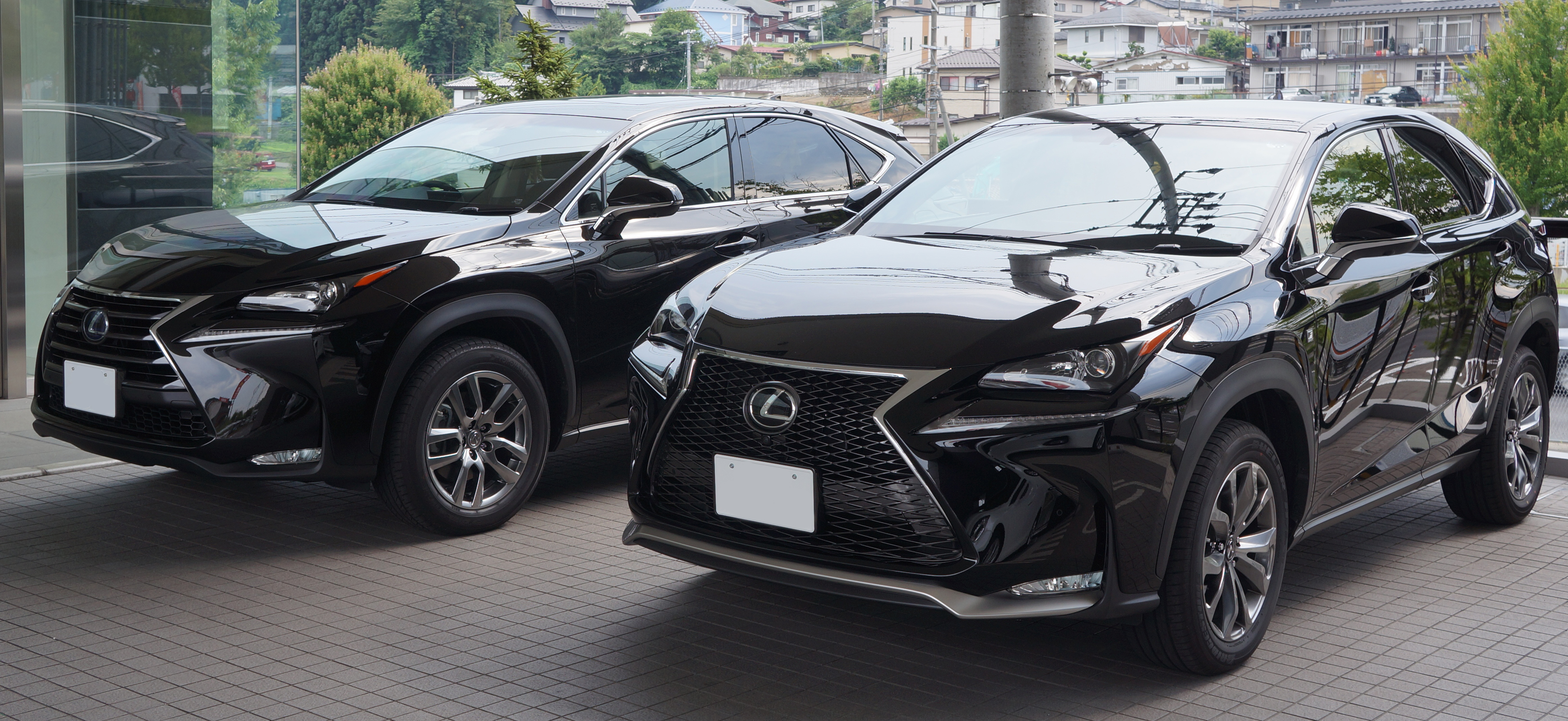 LEXUS NX300h&NX200tFSport Japan 2014